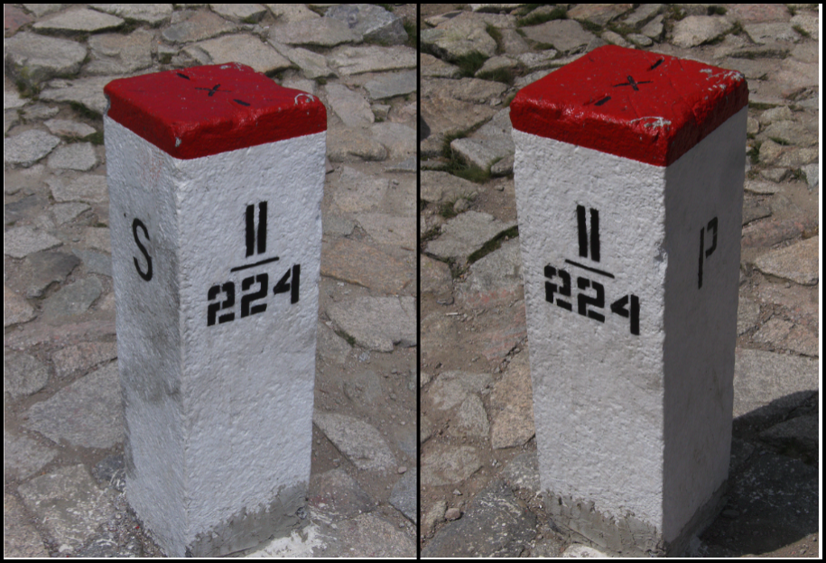 Bòla frontiera entre Polonha e Eslovaquia.